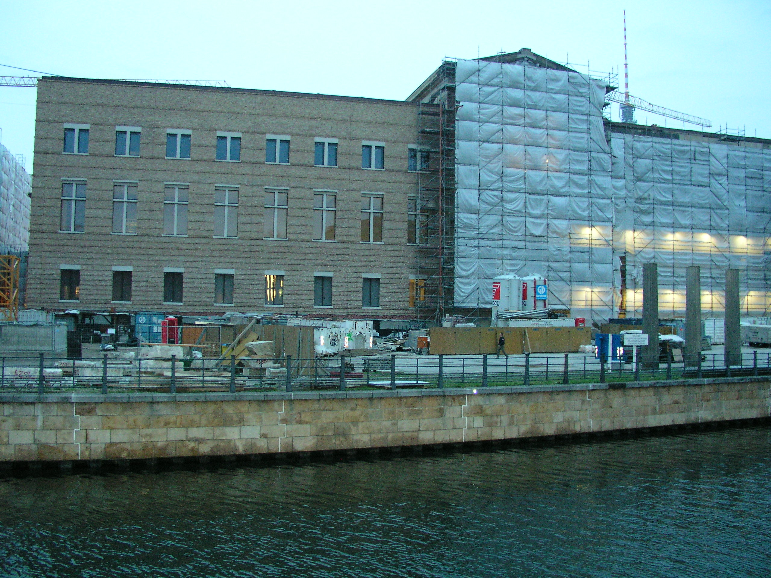 Das neue Museum in Berlin (Bauphase), Ansicht von der Spree